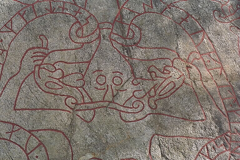 Detalj av människofigur på runristningen Sö175. Motiv: Sö175 Gislestenen Nyckelord: Runor Kategori: Runristning/runsten Detalj av människofigur på runristningen Sö175.